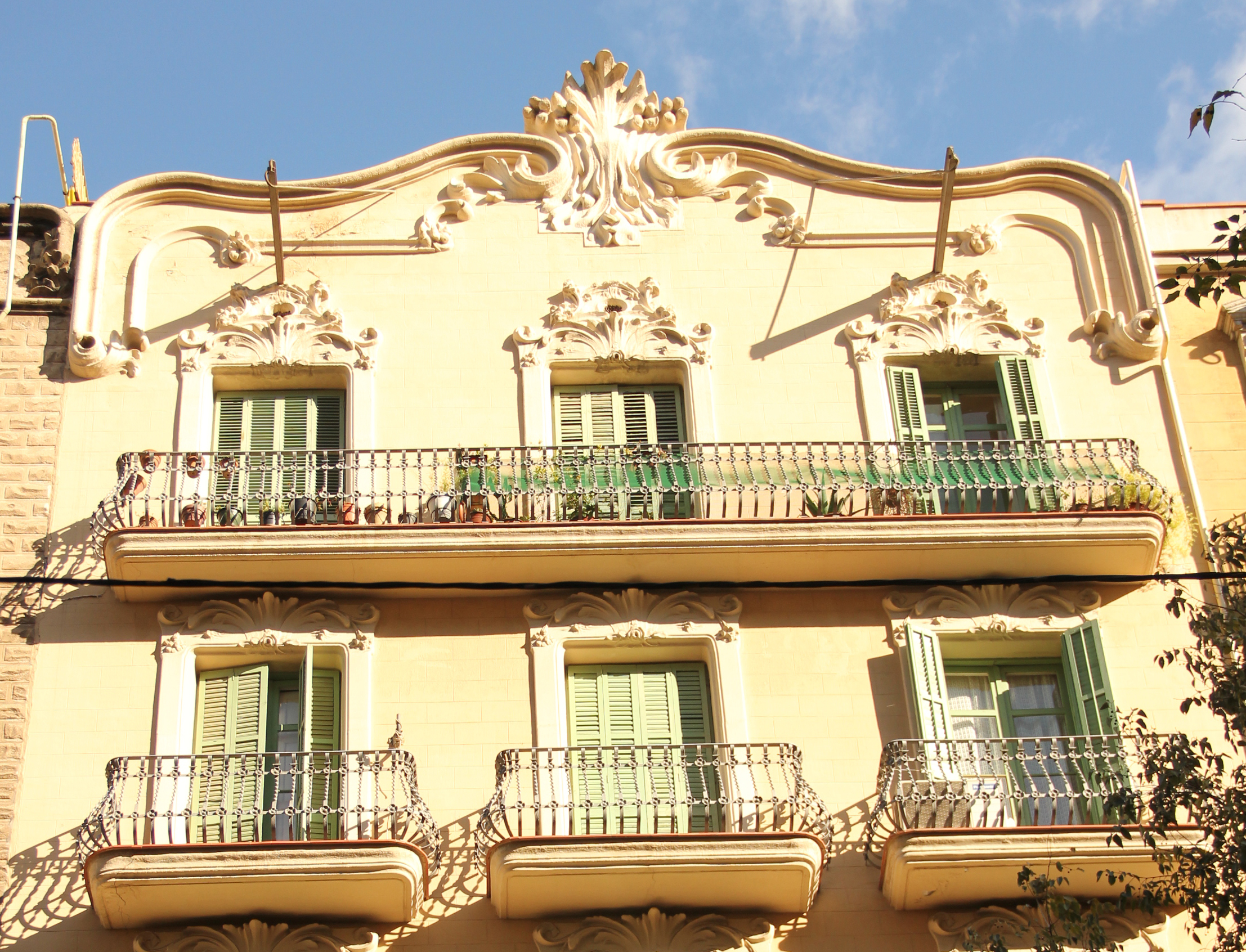 carrer compte borrell 72 a Barcelona de Josep Graner